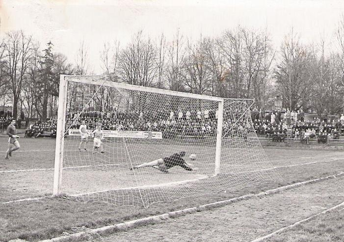 Stadion Pogoni Prudnik 1965-1975